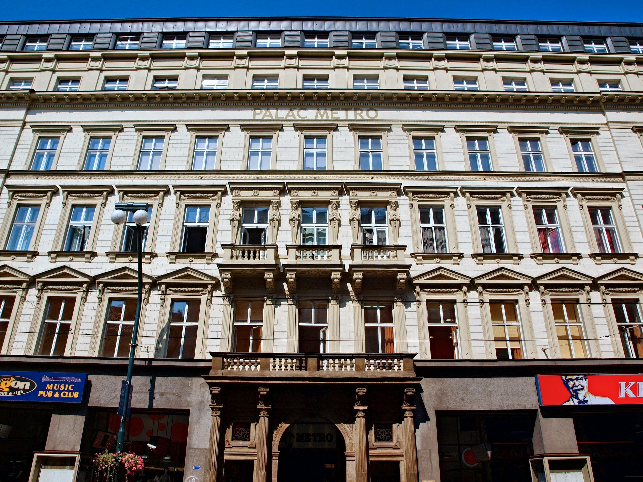 Palác Metro